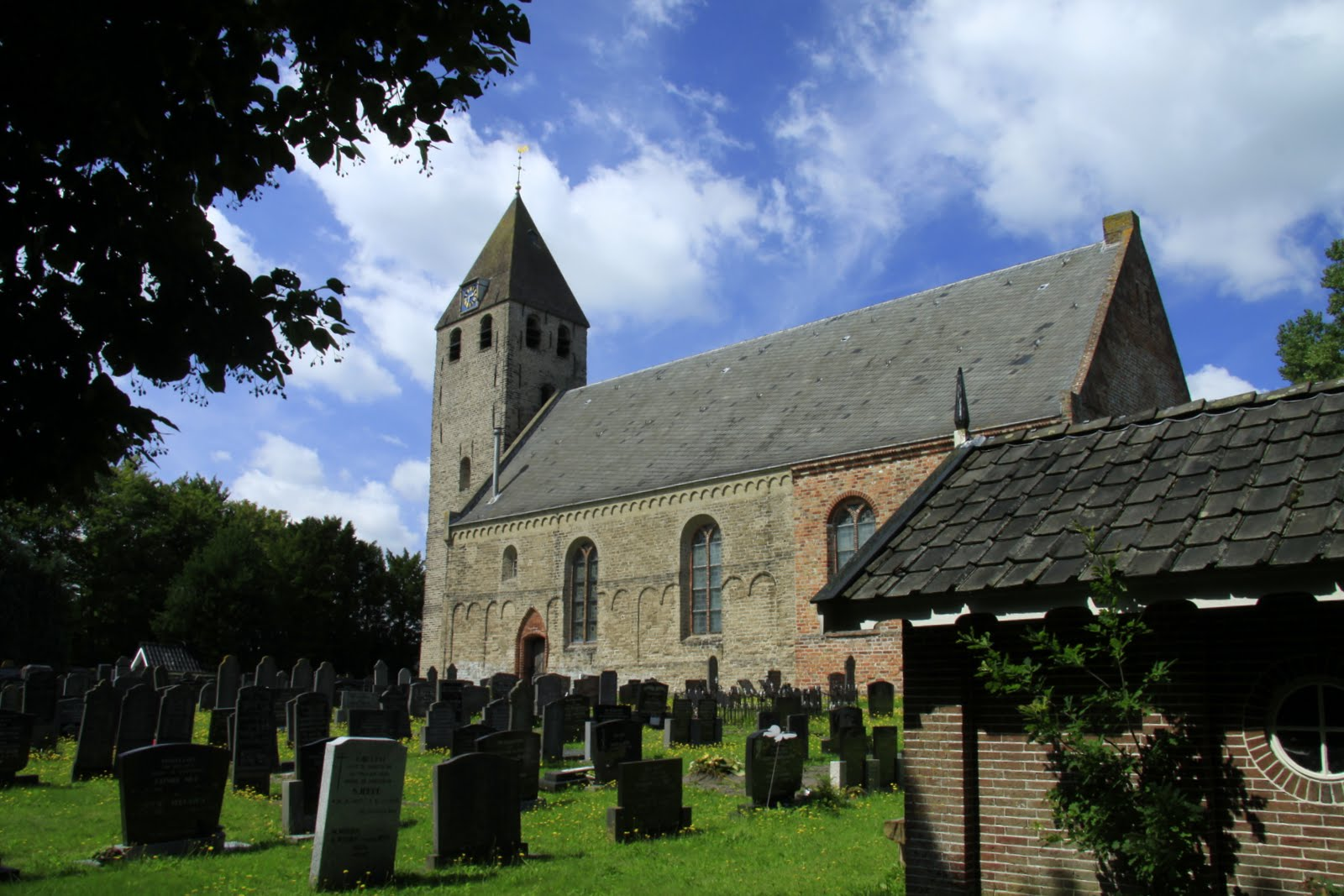 Sint-Agathakerk Oudega Smallingerland